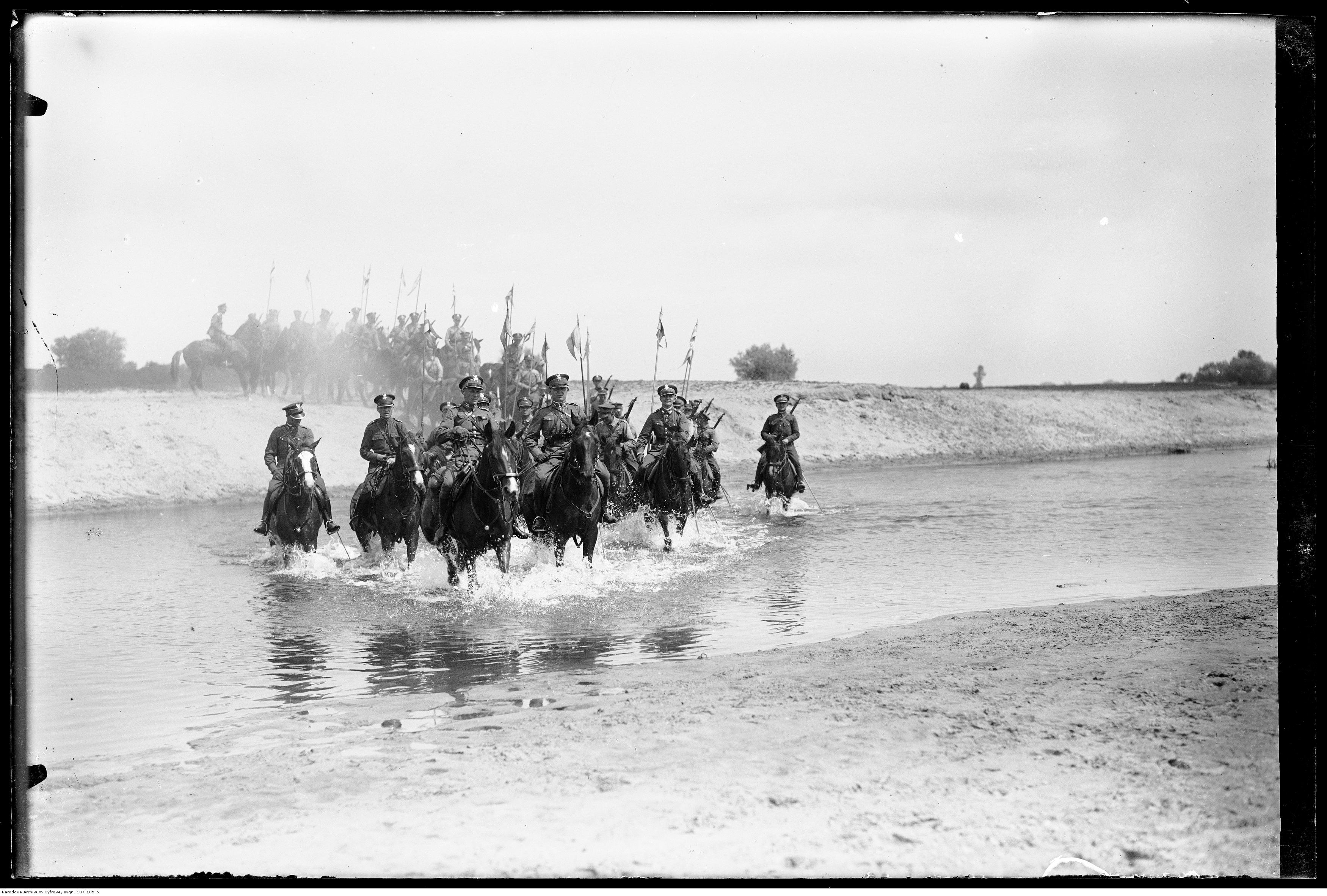 Konna przeprawa przez rzekę.